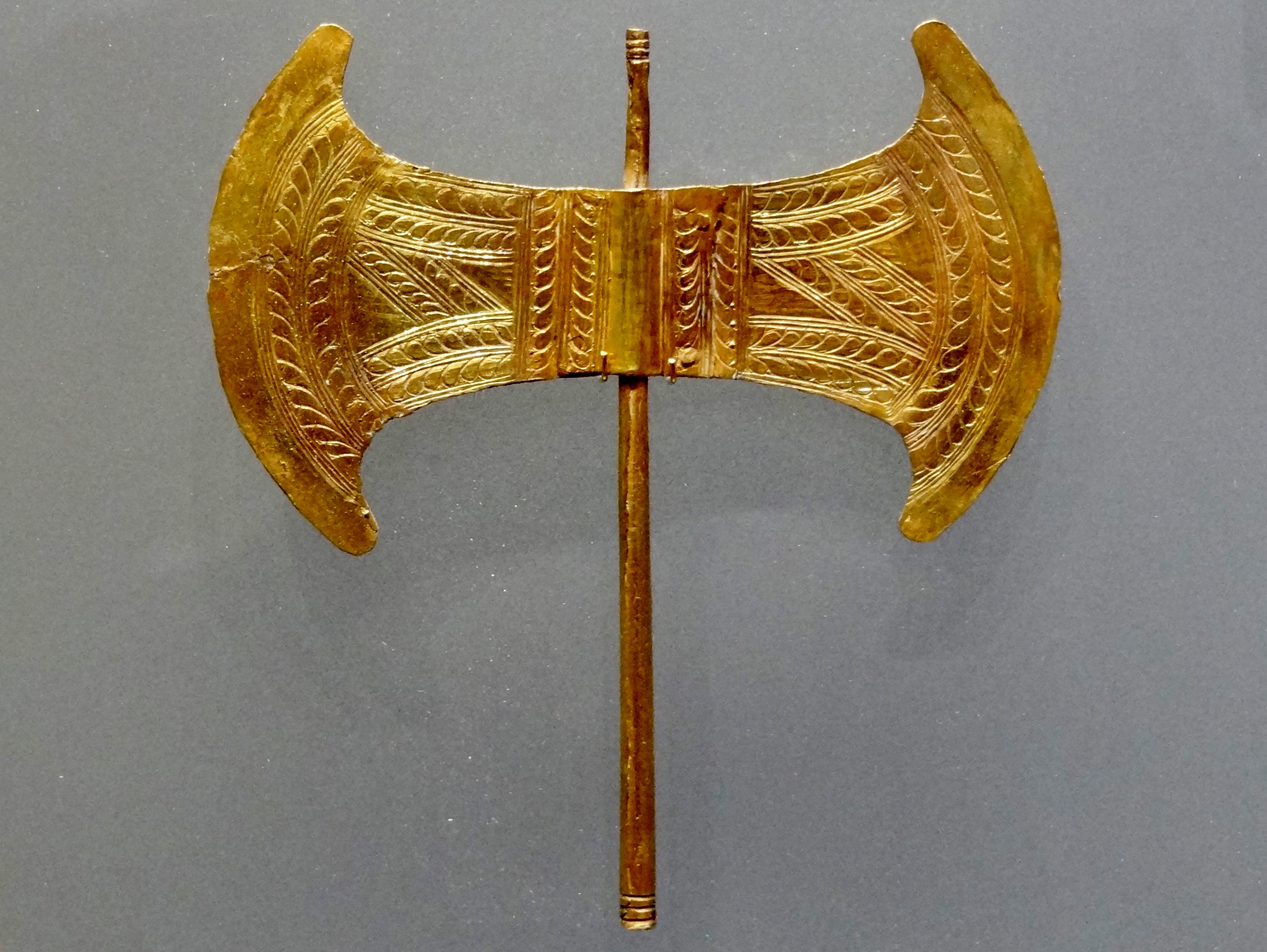 Goldene Votivdoppelaxt aus der Höhle von Arkalochori (1700–1450 v. Chr.), ausgestellt im Archäologischen Museum Iraklio, Kreta, Griechenland